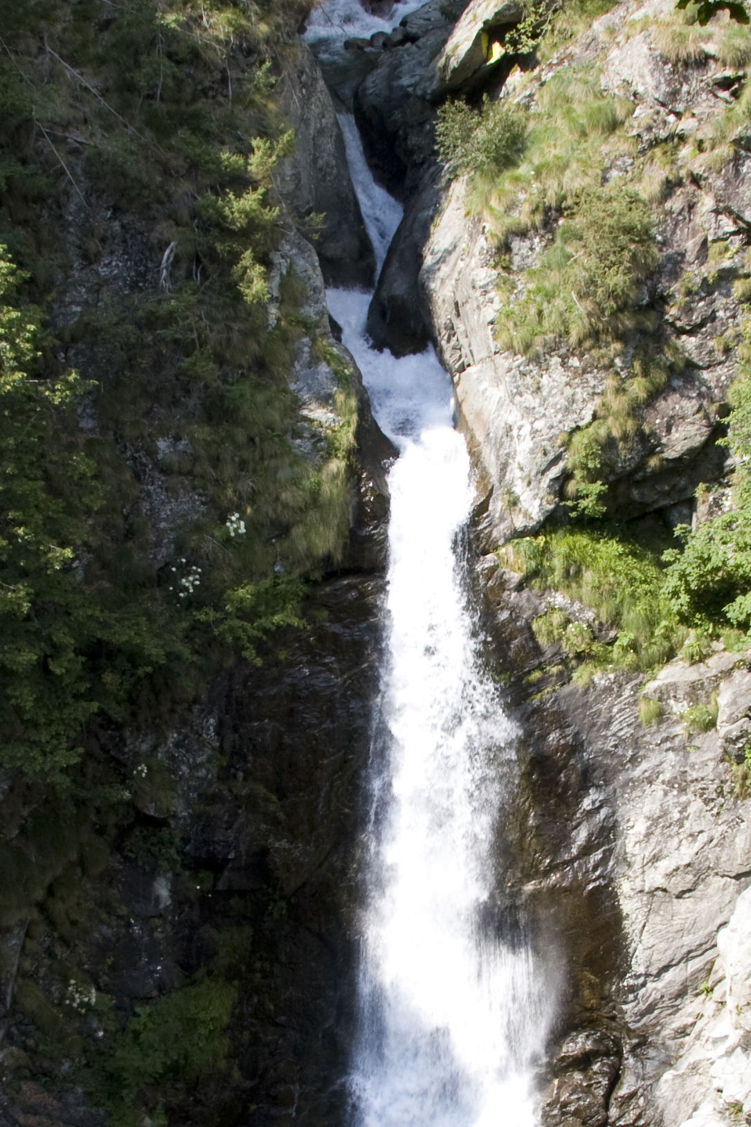 tinaccio